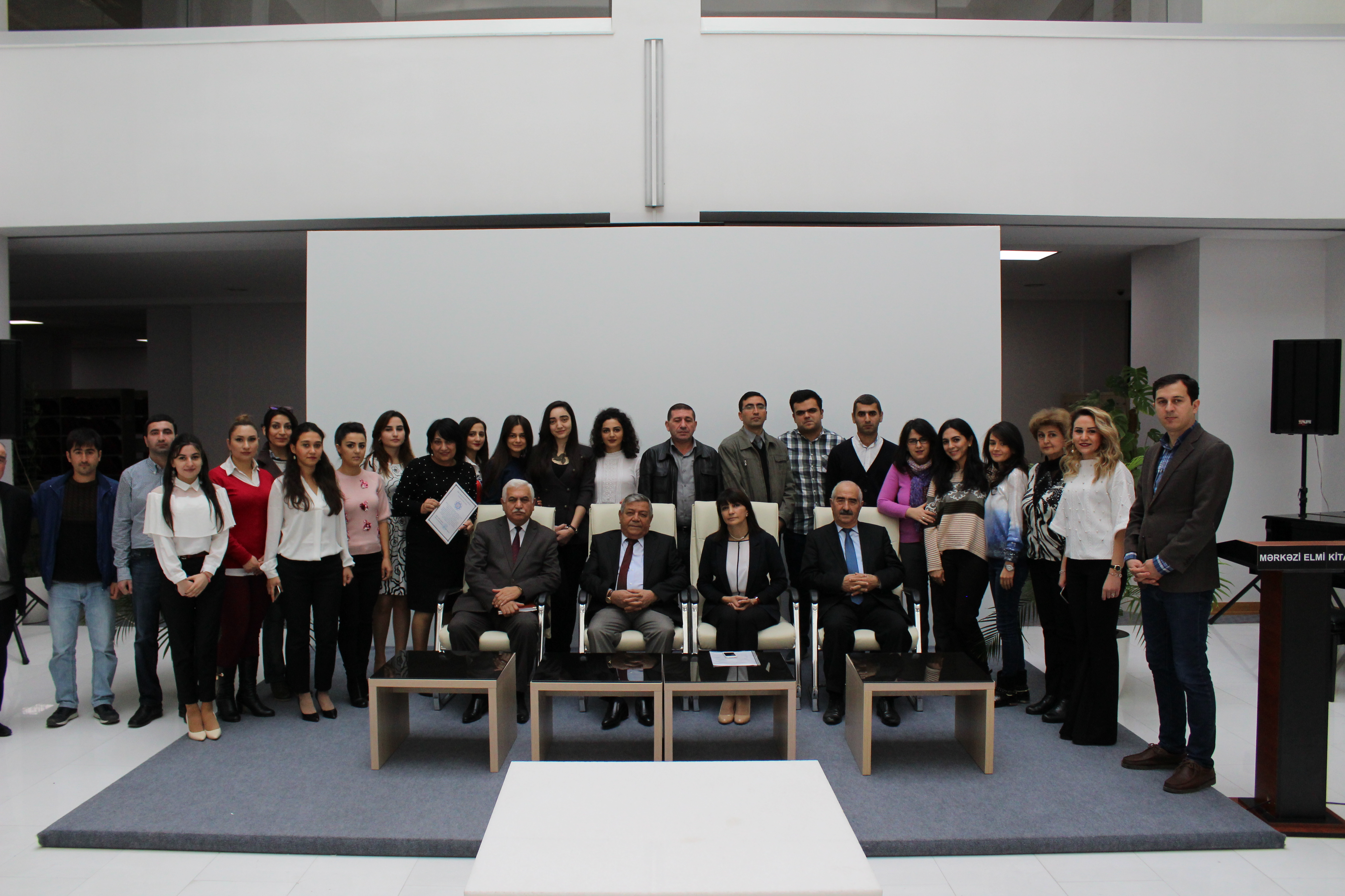 AMEA Mərkəzi Elmi Kitabxanasında (MEK) “Vikipediyada mövzulu ay və mukafatlandırma” mövzusunda tədbir